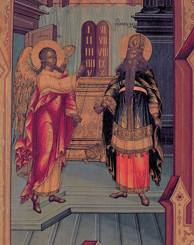 Annunciation to Zechariah. Fragment of russian icon "Execution of St.John Baptist". Благовестие Захарии. Фрагмент иконы "Усекновение главы святого Иоанна Предтечи". Данилов монастырь, происходит, вероятно, из храма святителя Николая Чудотворца в Лефортово